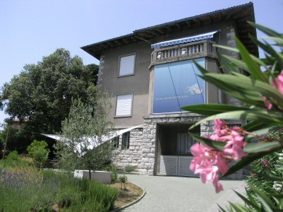 Prirodoslovni muzej Rijeka